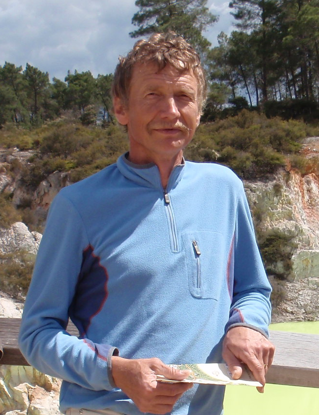 Johannes Tasa (2010)